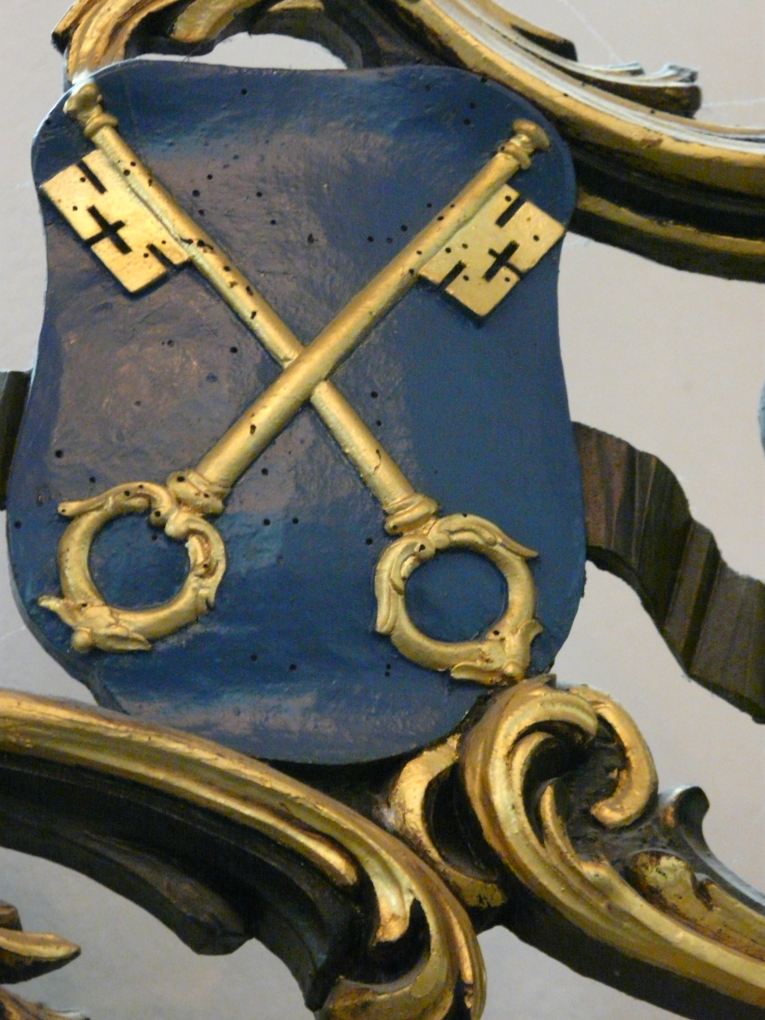 coats of arms of the former chapter of St.Peter in utrecht (NL)